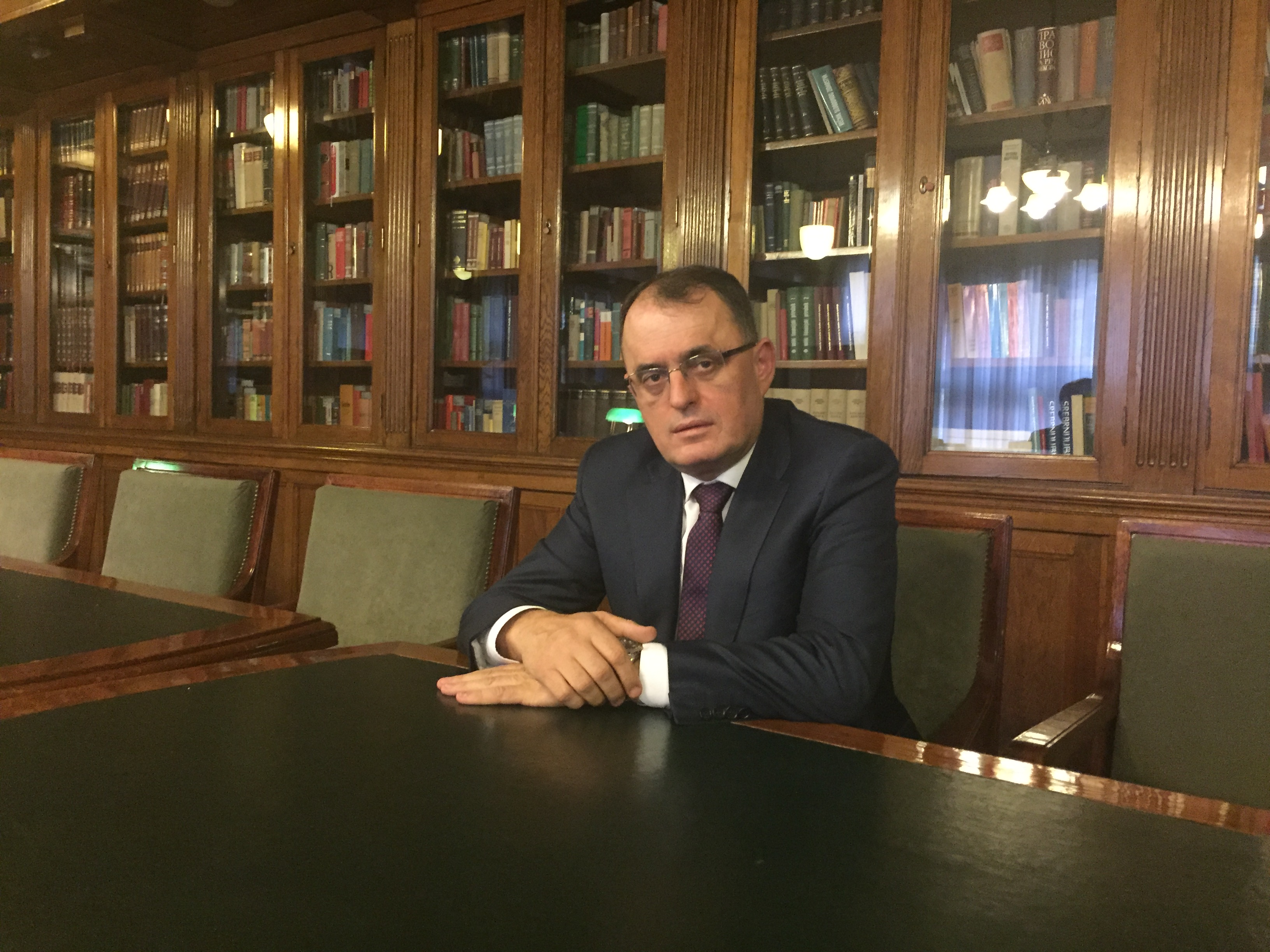 Владан Заграђанин